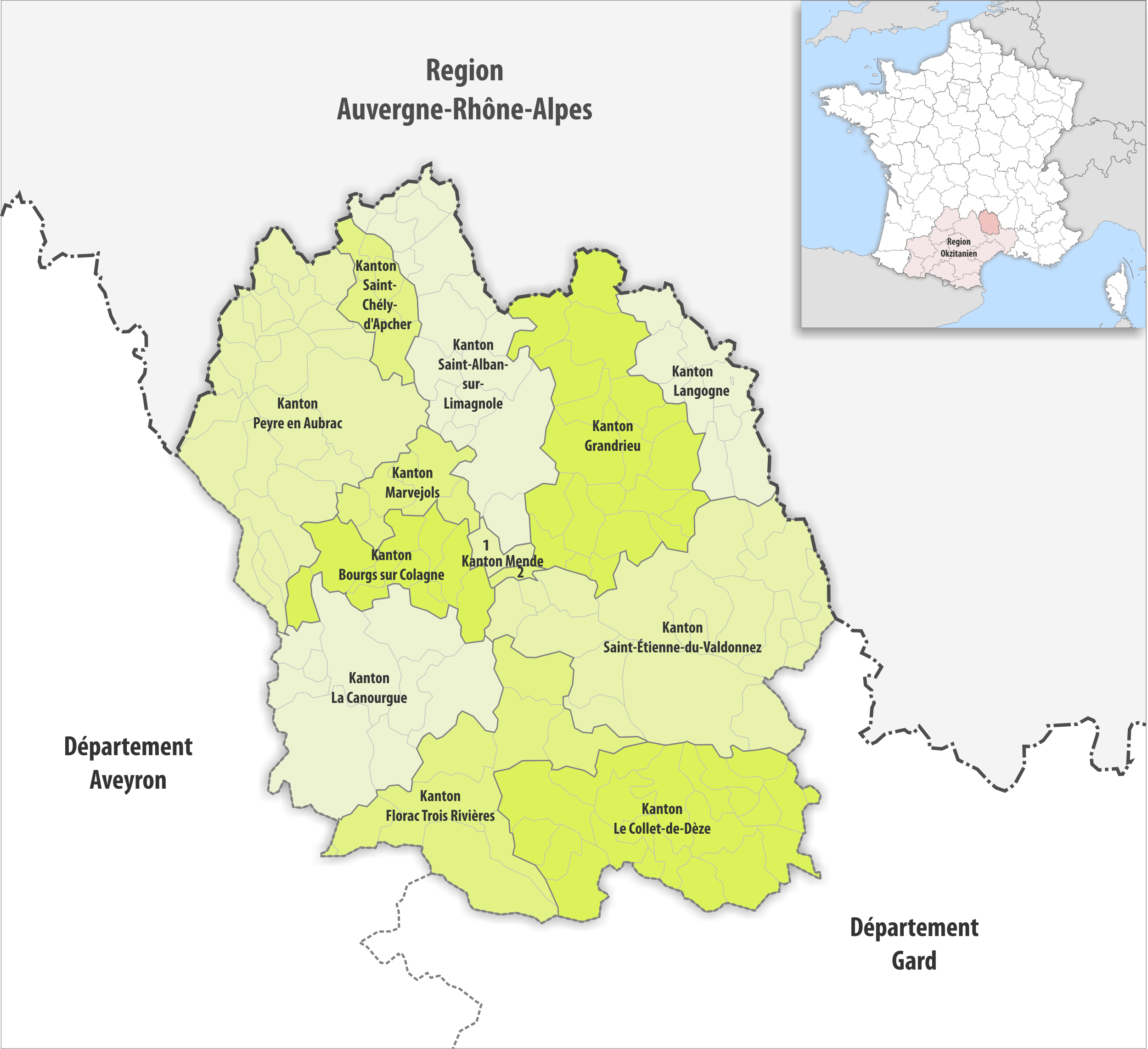 Gemeinden und Kantone im Departement Lozère